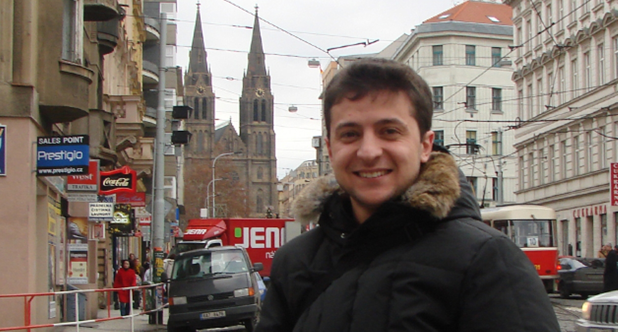 Украинский деятель шоубизнеса, актёр, продюсер Владимир Зеленский